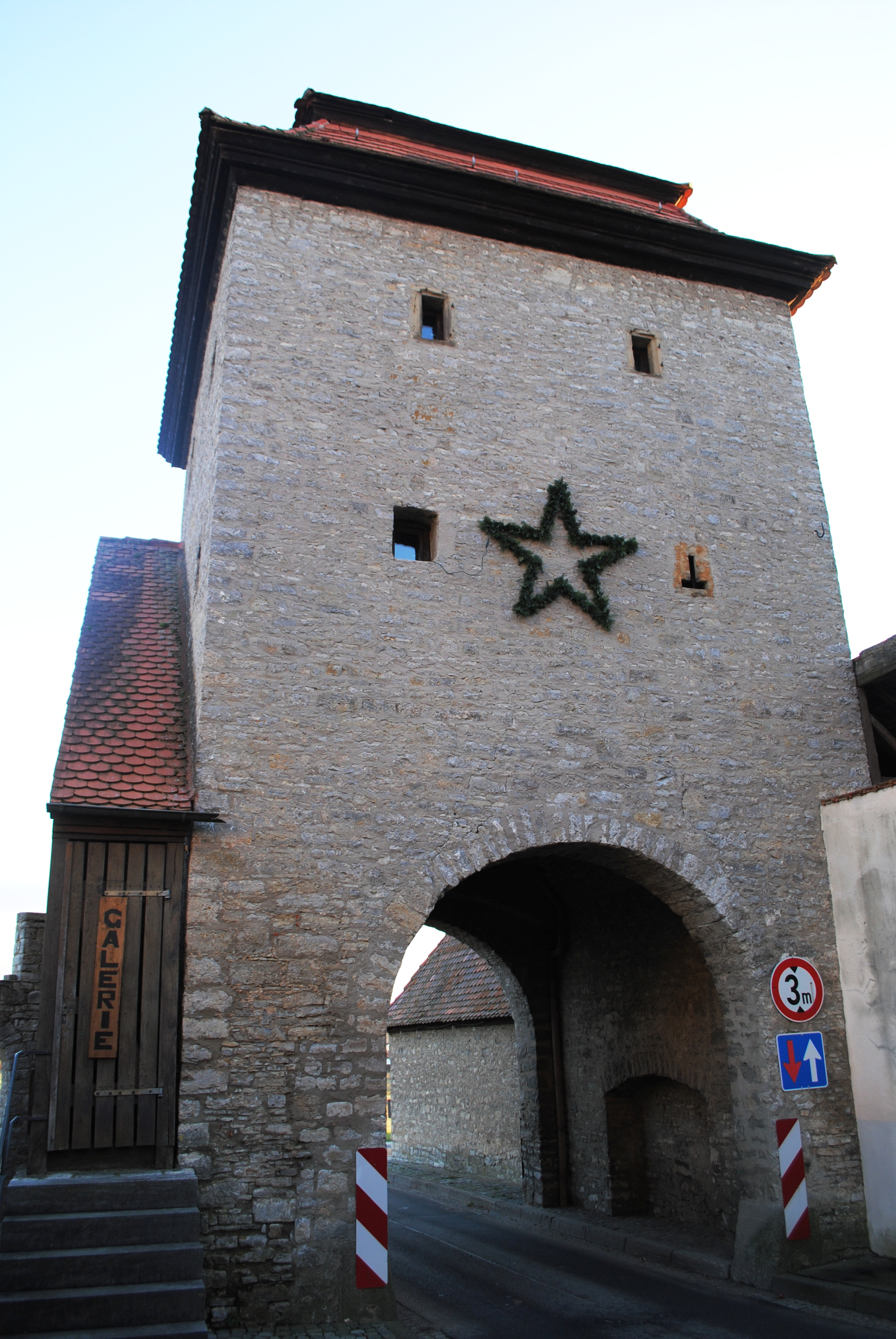 Schwarzacher Tor, Hauptstraße 22, Sommerach, Torturm aus unverputztem Bruchsteinmauerwerk mit rundbogiger Durchfahrt und Mansarddach, Wappenstein bez. 1487; D-6-75-169-69